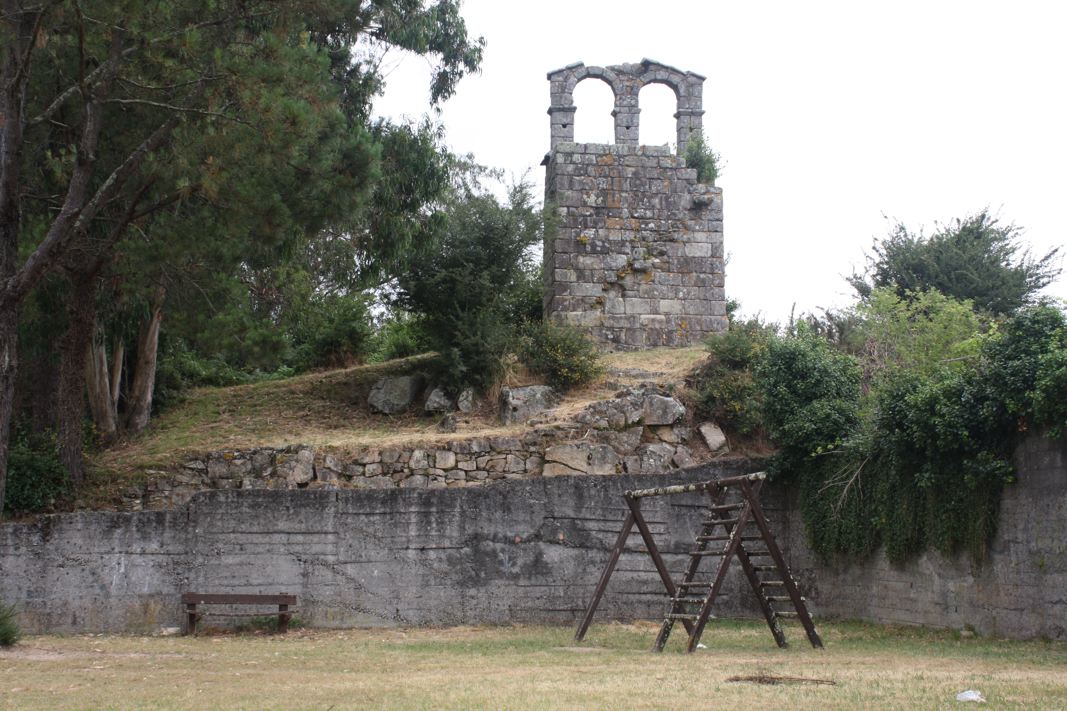 Torre de Cálago, único resto que queda do Mosteiro do mesmo nome, do século VII, en Vilanova de Arousa (Pontevedra). A silueta da torre forma parte do escudo da cidade.